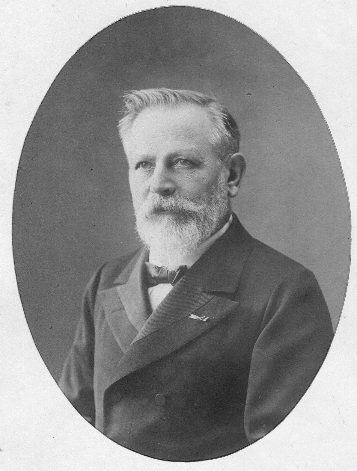 Charles E. Soubre Architecte